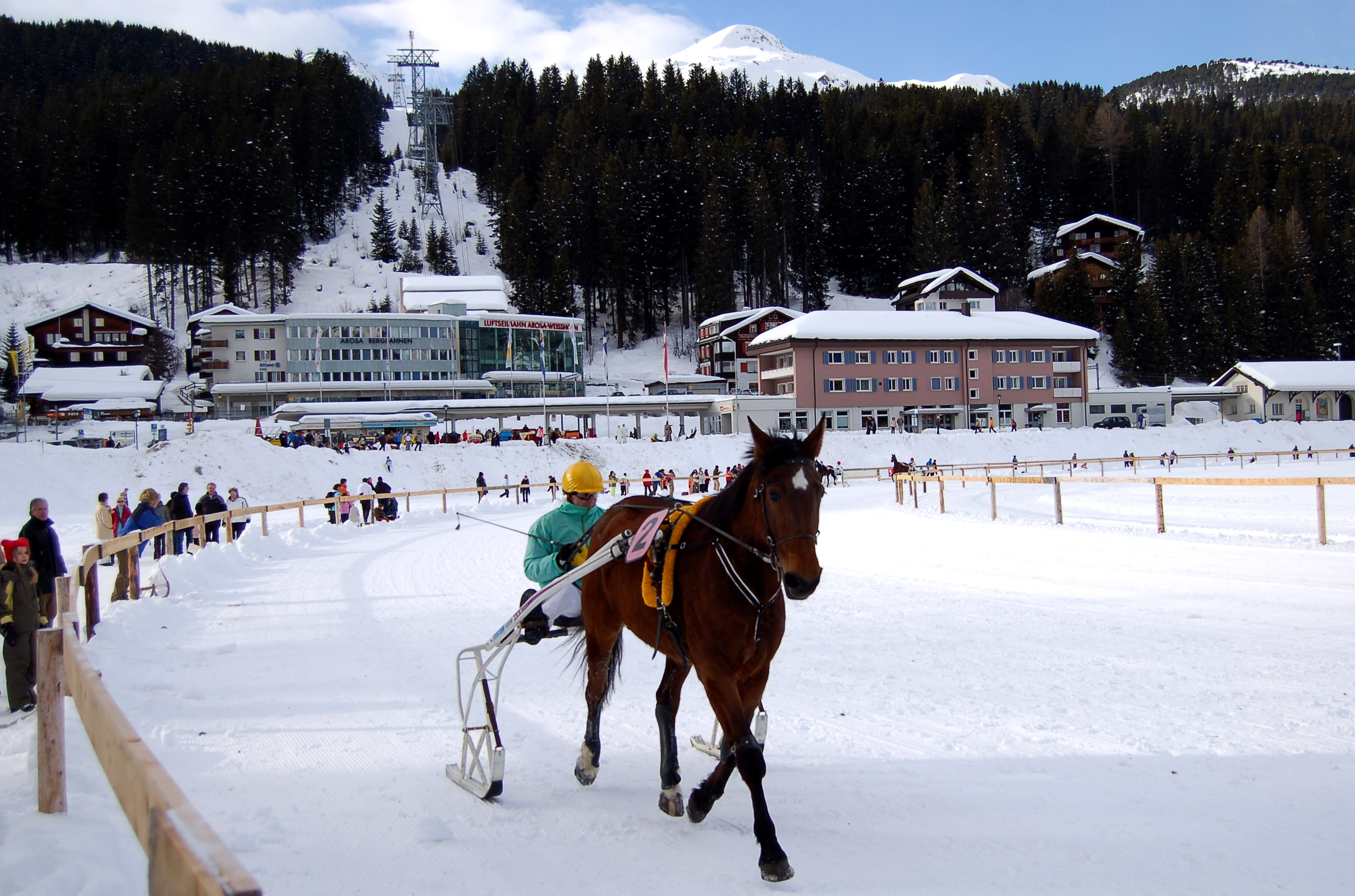 Pferderennen auf dem Obersee Arosa Feb 2009